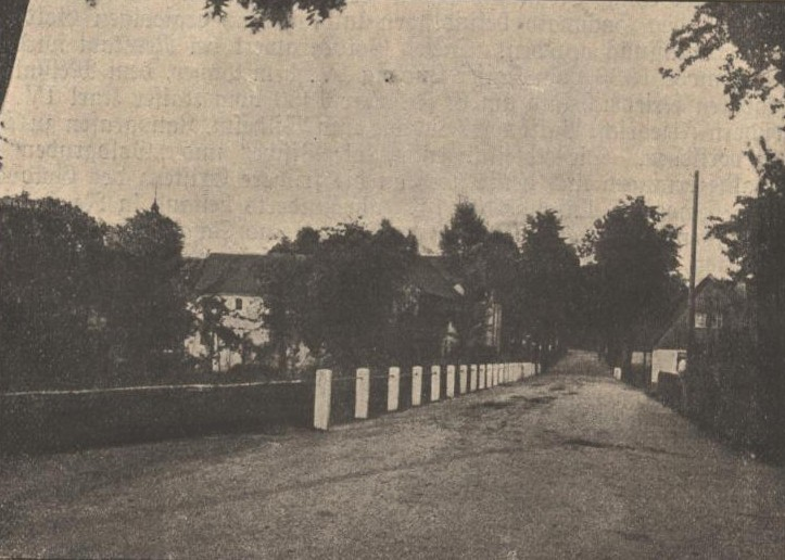 Beiträge zur Sächs. Volks- und Heimatkunde. Mit Zeichnungen von Professor O. Seyffert und Maler F. Rowland.